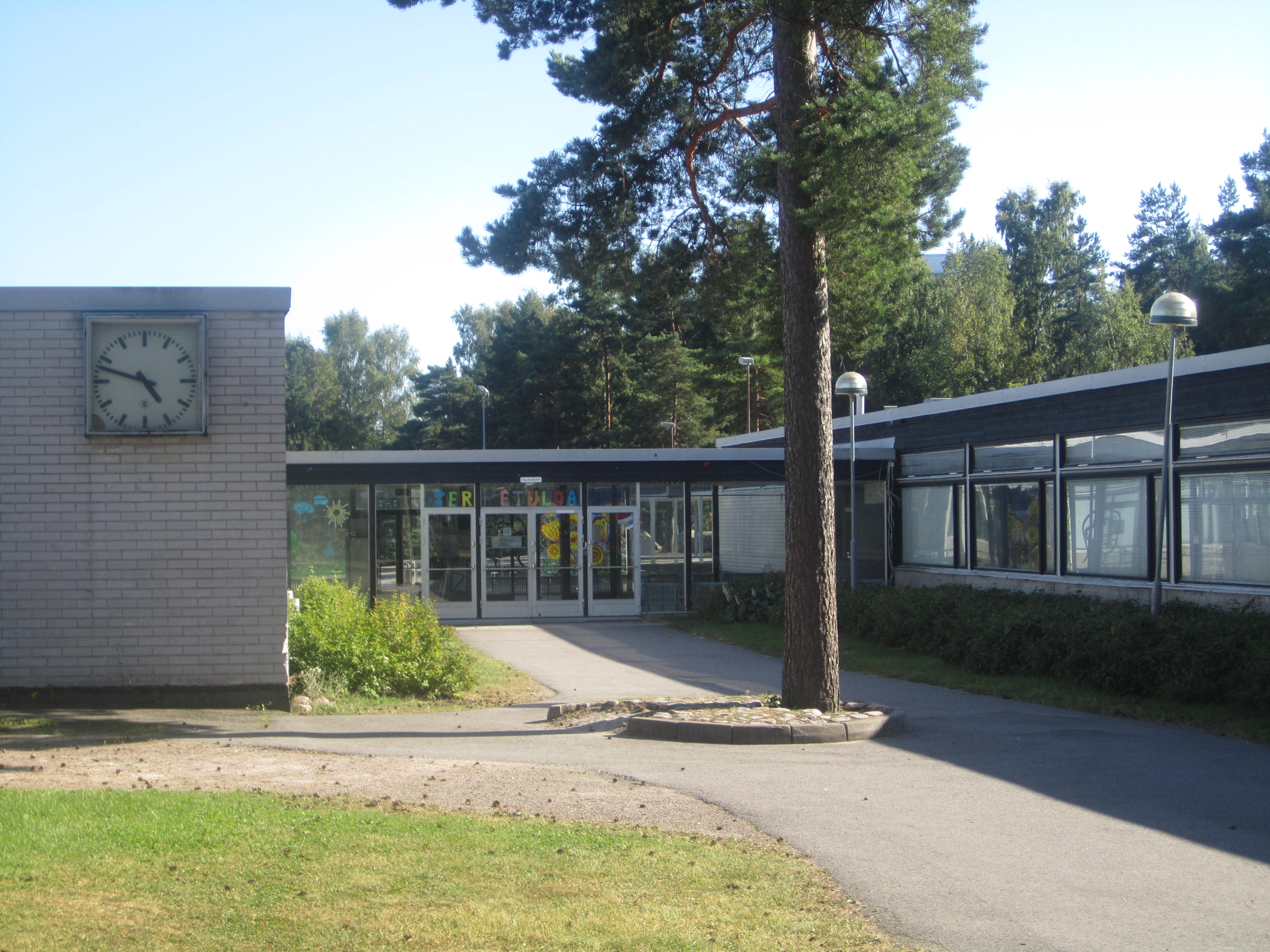 Vesalan ala-aste Helsingin Kontulassa.